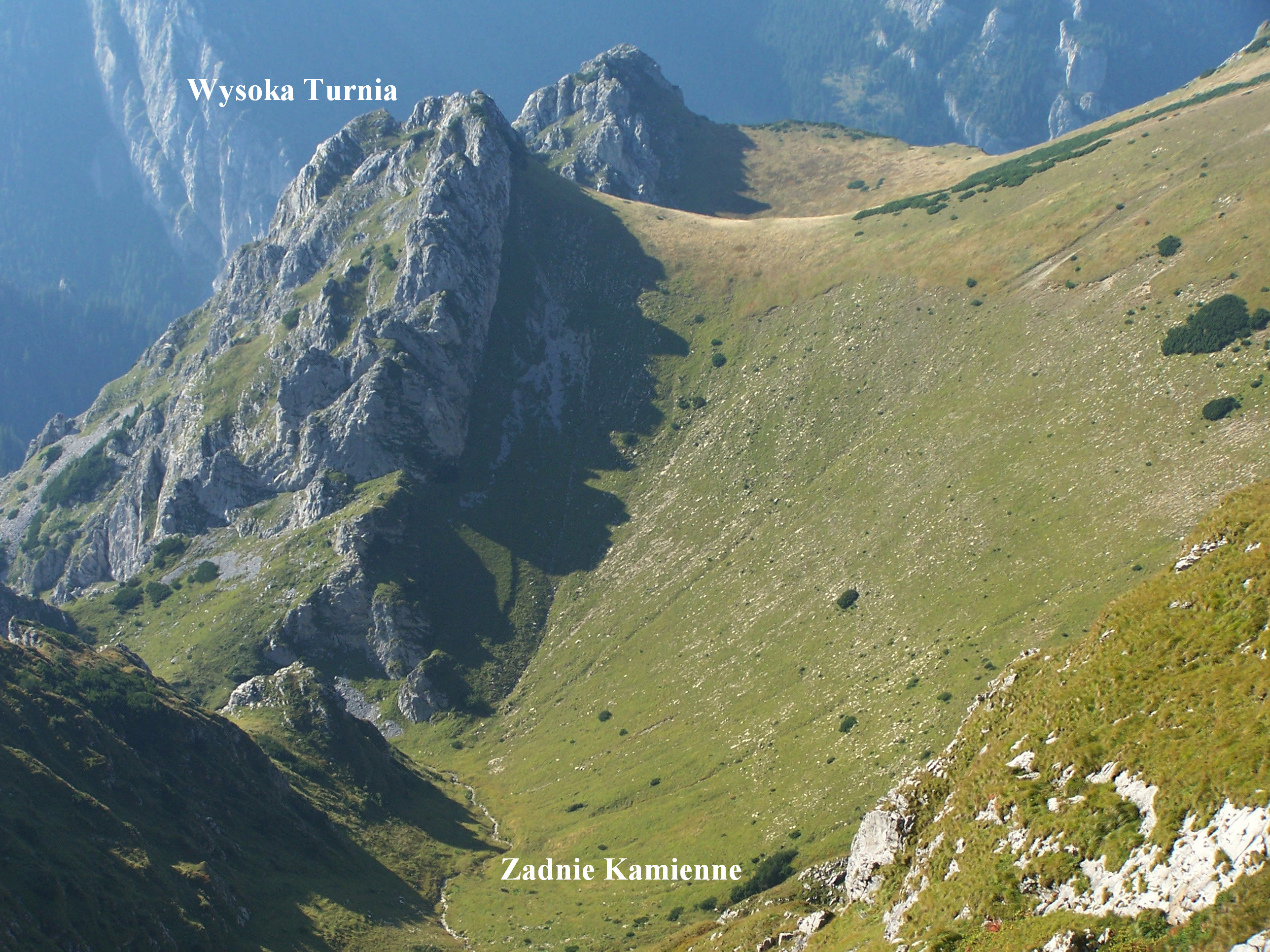 Wysoka Turnia (Czerwone Wierchy, Tatra Mountains)